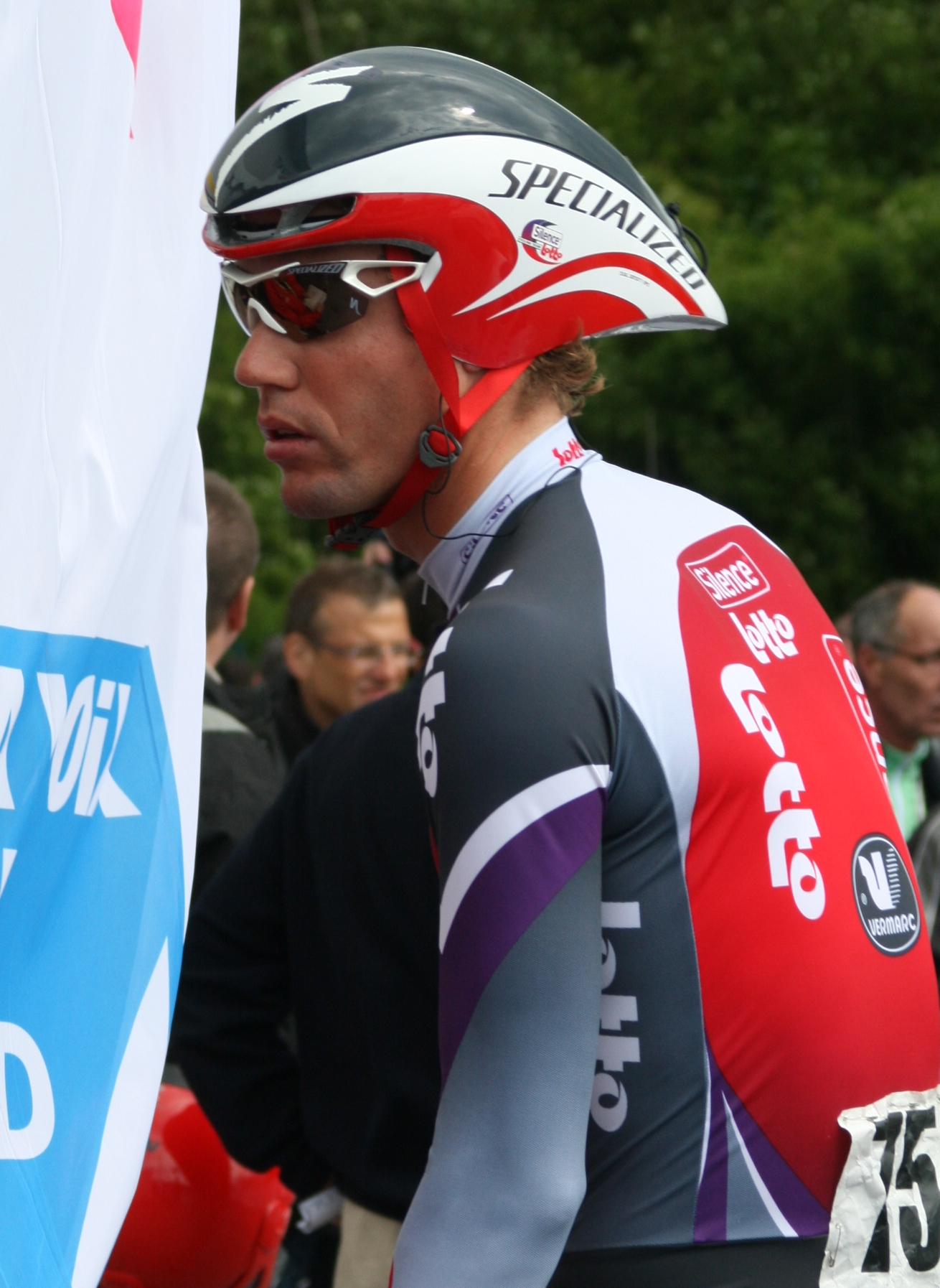 Michiel Elijzen, durant les Quatre jours de Dunkerque 2009, à Douai